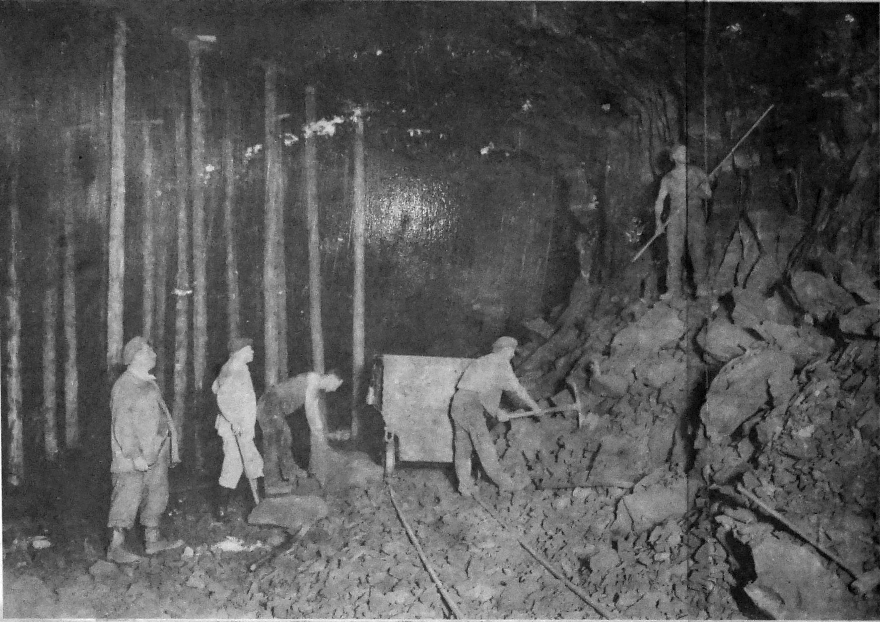 sur une vue ancienne.